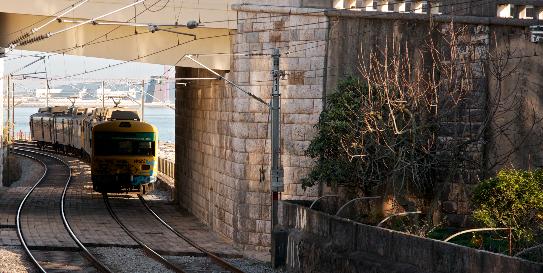 Tipo: Comboio Urbano 19075 [Cais do Sodré - Cascais] Local: Caxias [Linha de Cascais , PK 11] Data e hora: 21 de Janeiro de 2012 [16h37] Material: Automotoras 32xx e 31xx [Unidade Quádrupla Eléctrica + Unidade Tripla Eléctrica]